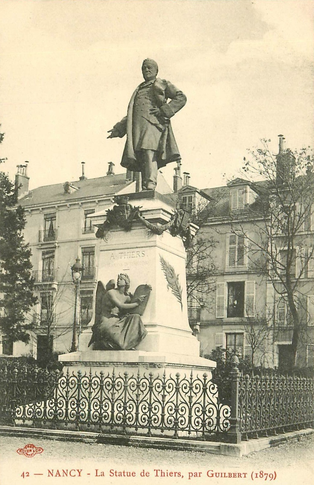 Carte postale du début du XXe siècle montrant la statue de Thiers à Nancy.